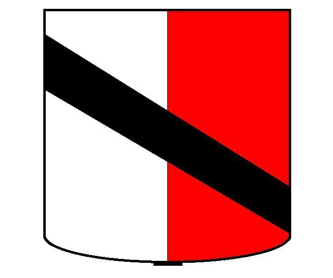 Grb porodice Cambio